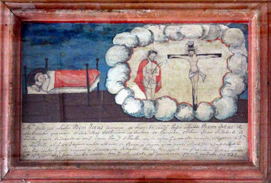 Ex-voto no Santuário de Congonhas, datado de 1832